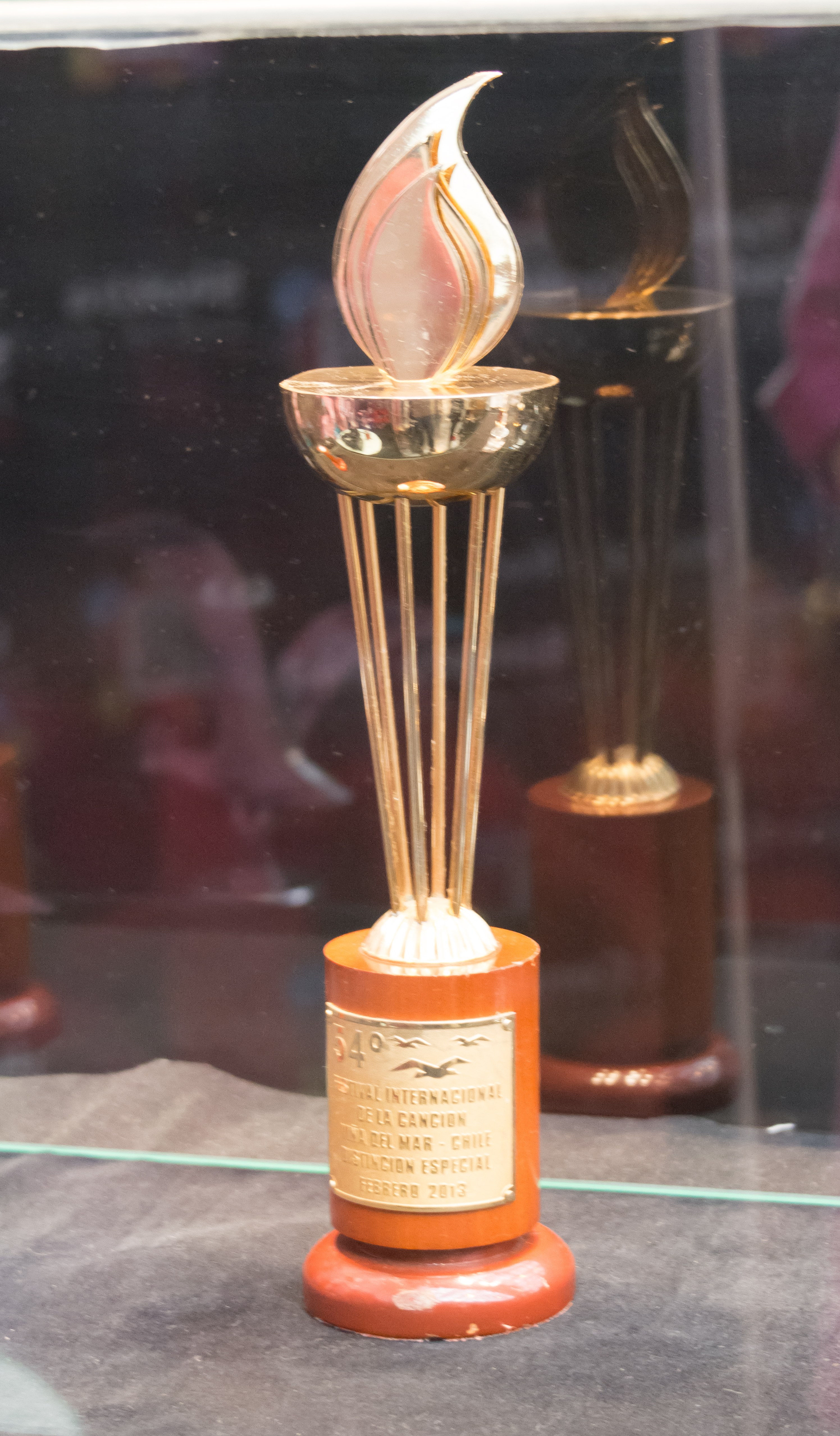 Feria vacaciones tercera edad Sernatur 2019, Providencia, Santiago, Chile.